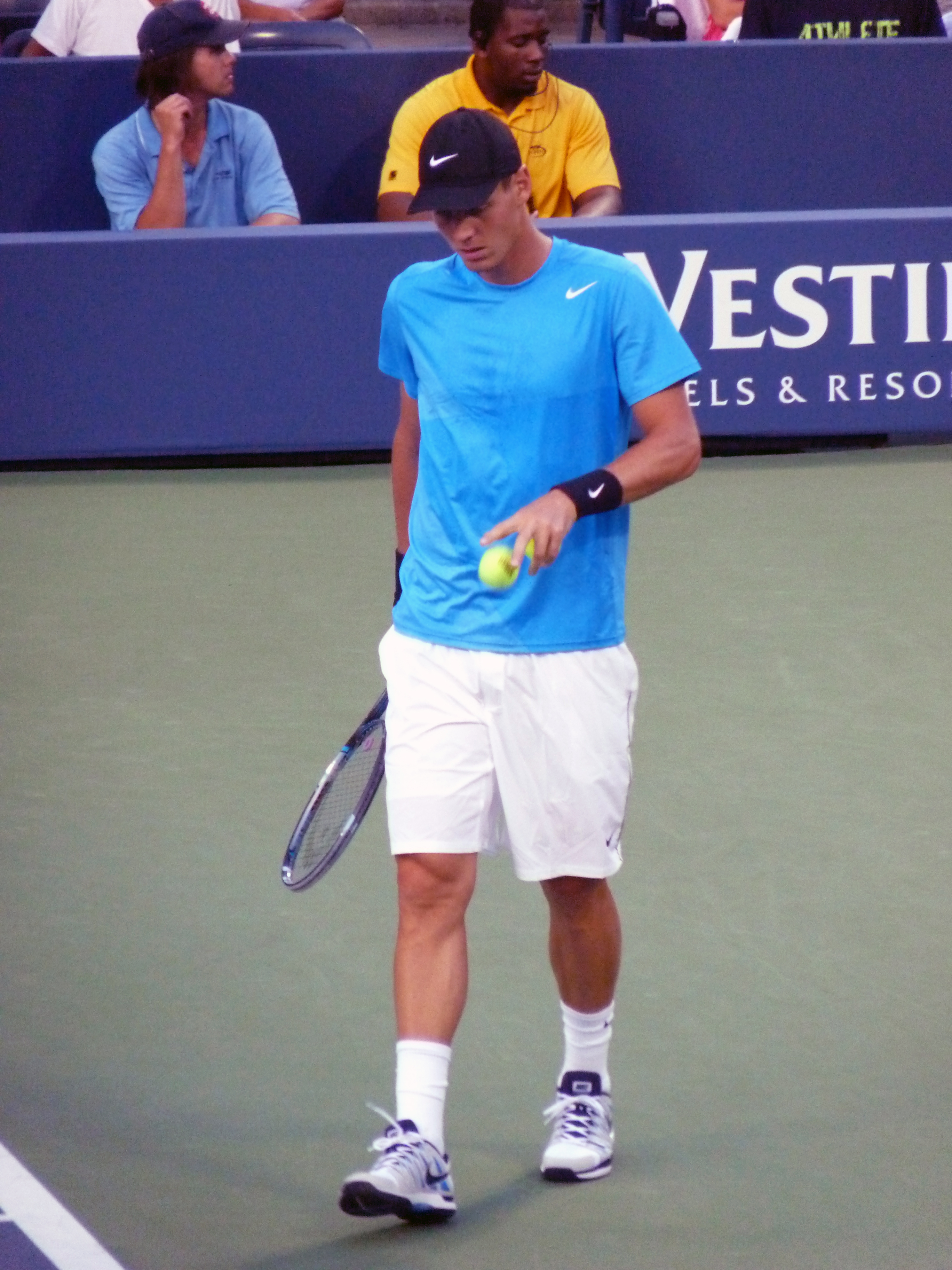 US Open 2012 Men's Singles 3rd Round (Louis Armstrong Stadium# Tomáš Berdych [6] vs. Sam Querrey [27] 6–7#6–8#, 6–4, 6–3, 6–2